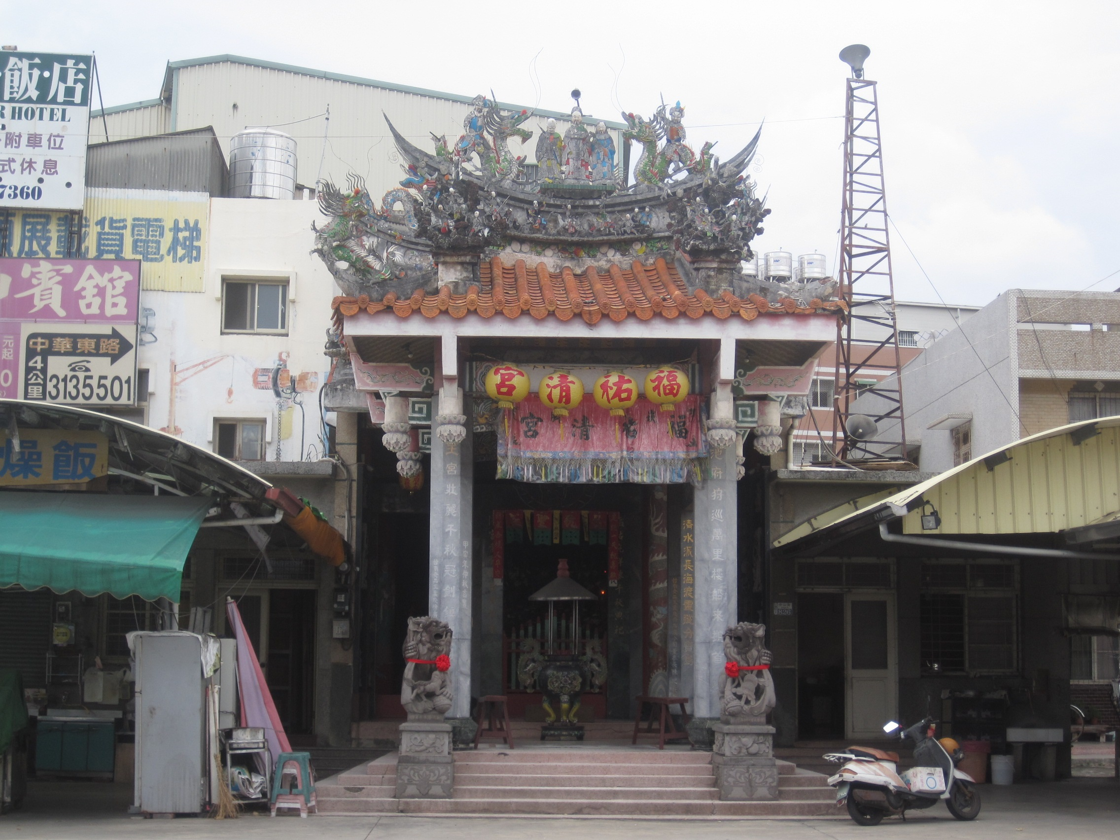 2015年拍攝，重修前的崁腳福祐清宮。